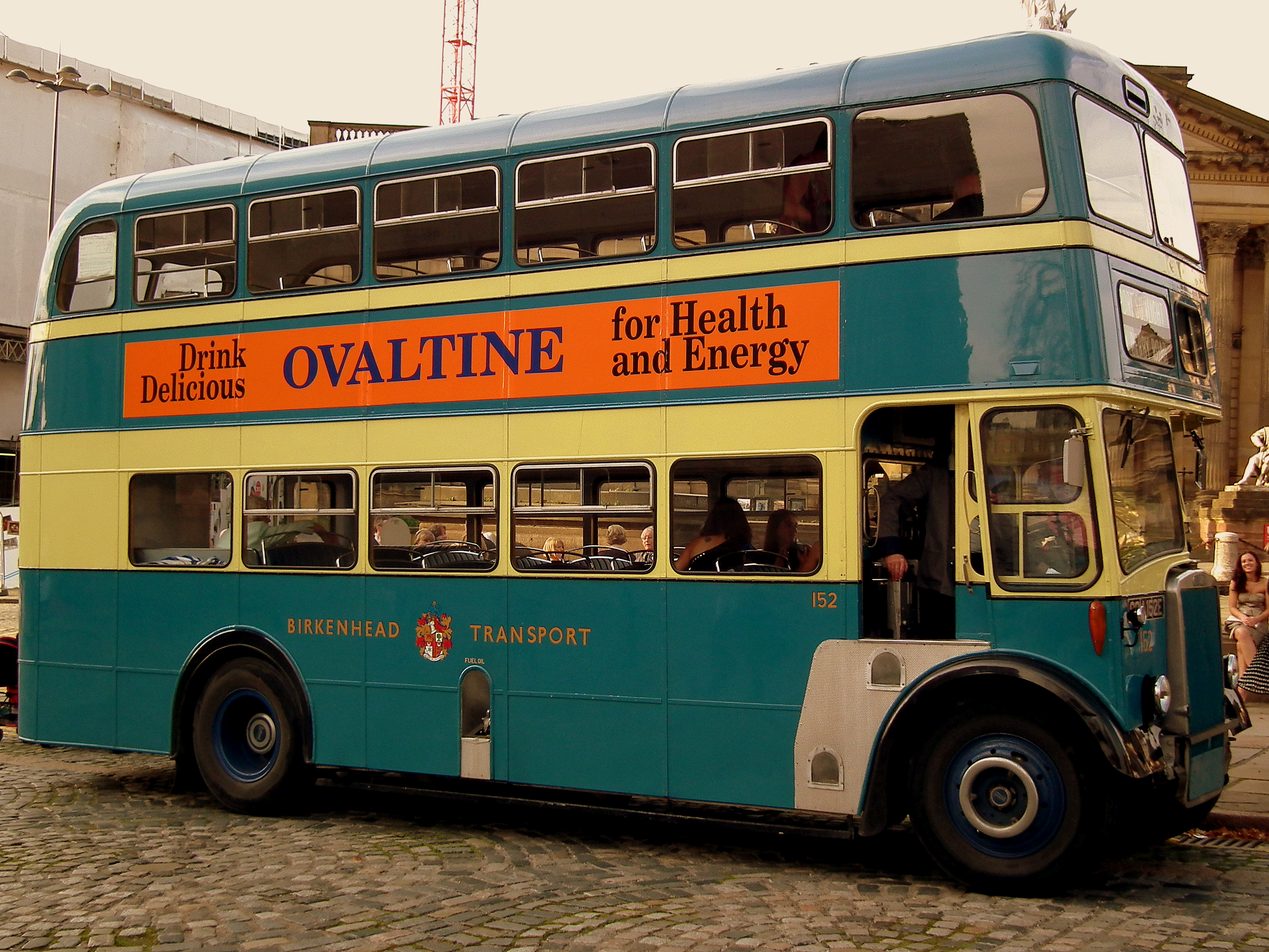 BIRKENHEAD CORPORATION LEYLAND TITAN NO 152 LIVERPOOL SEP 2011